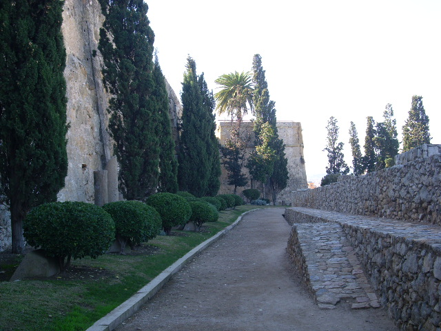 Murallas, Tarragona, novembro 2009